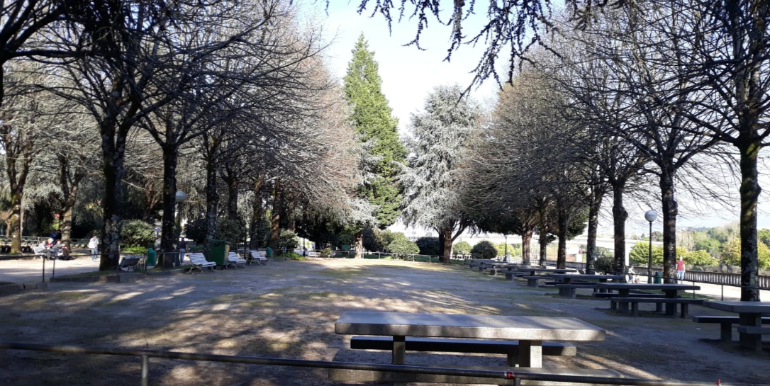 Merendeiro con mesas de pedra e sombra